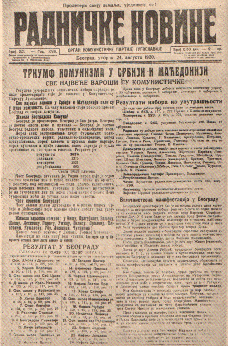 Srpskohrvatski / српскохрватски: Radničke novine od 24. avgusta 1920. godine sa vestima o trijumfu komunizma na izborima u Srbiji i Makedoniji. Iste godine, Komunistička partija Jugoslavije je zabranjena dekretom.